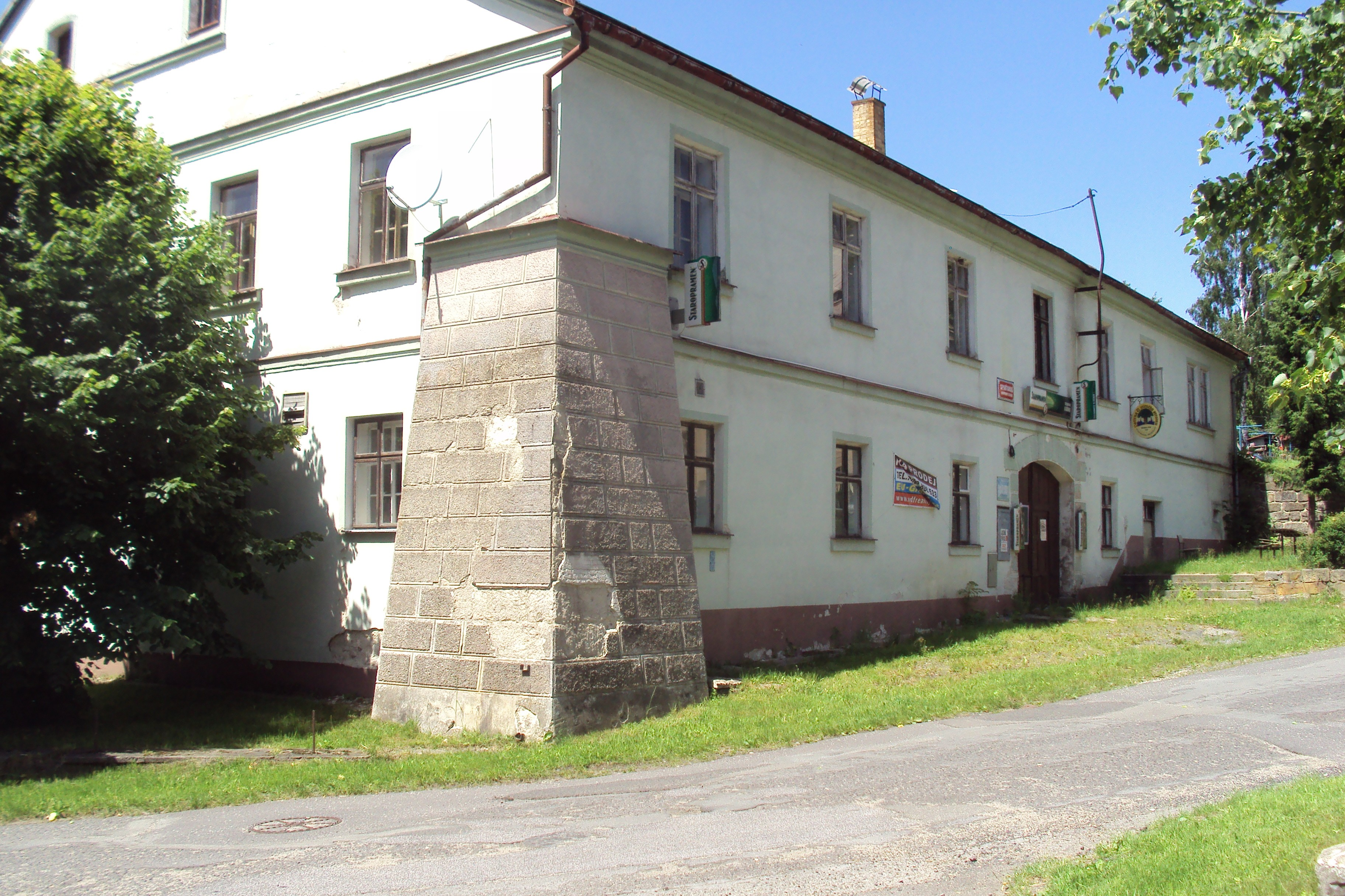 Zavřená restaurace na středověkkých základech